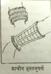 प्राचीन हस्तभुषने